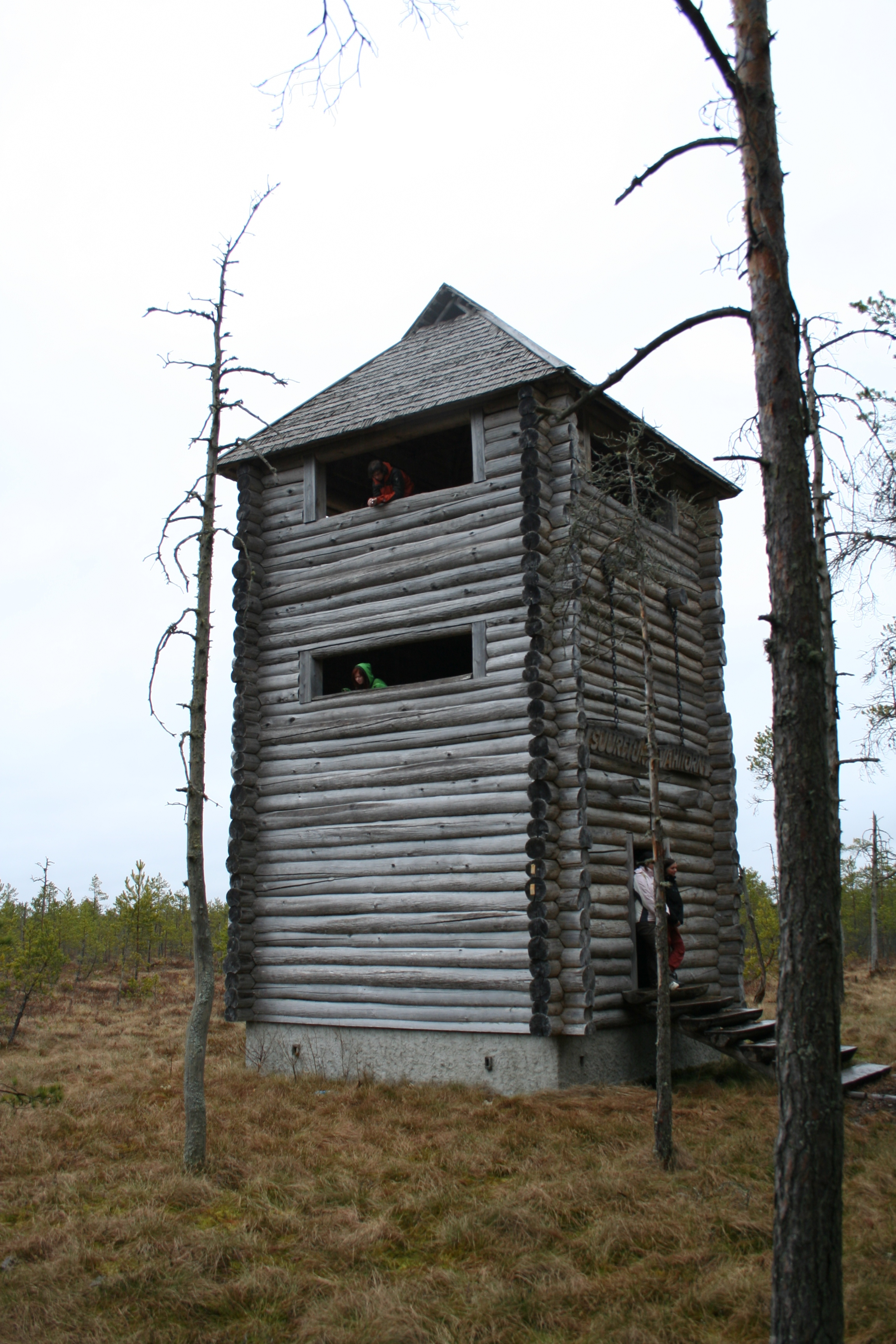 Selli-Sillaotsa õpperada, Suuretüki vahitorn